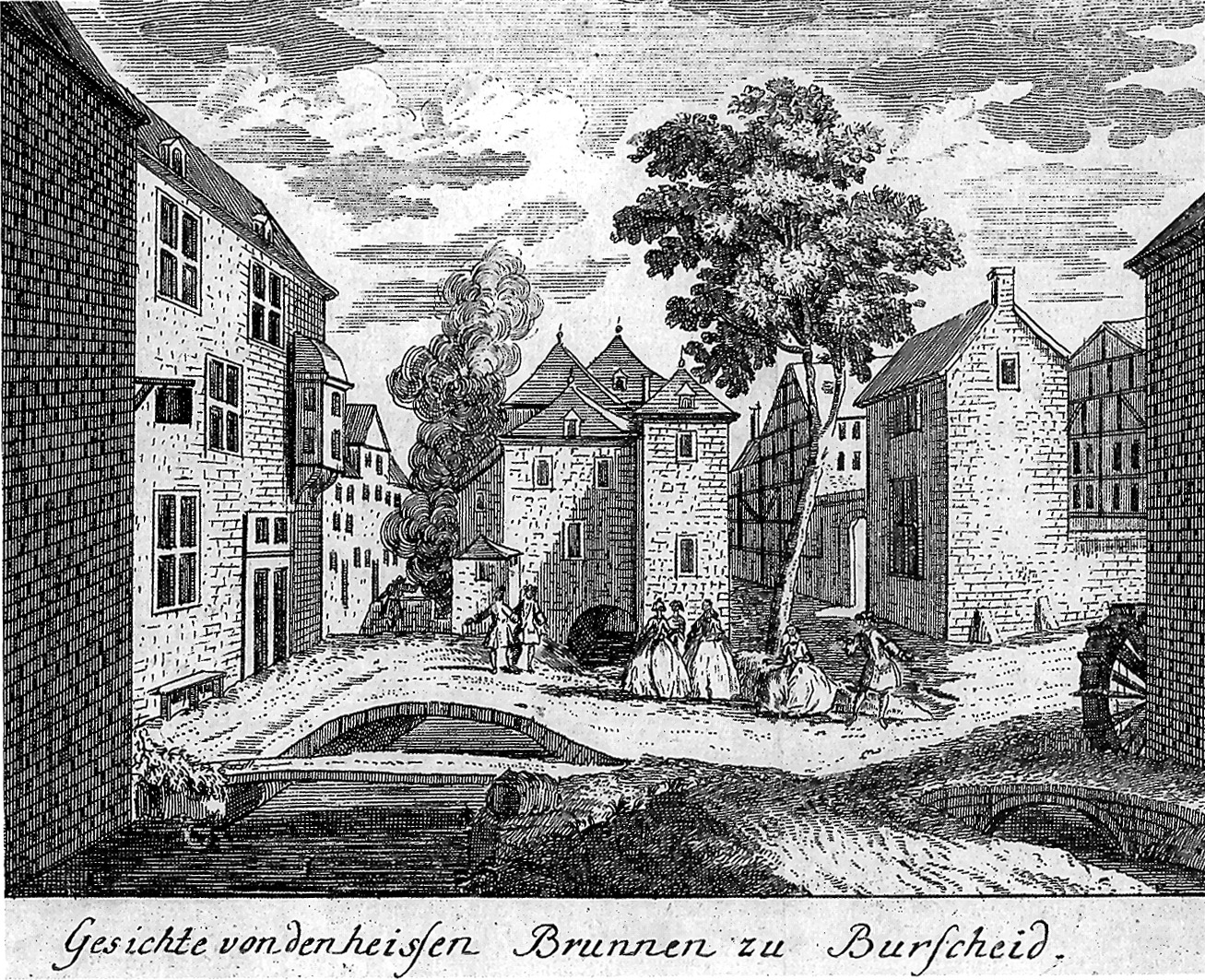 Alte Grafik mit der Darstellung des Kochbrunnens (erkennbar an der Dampfwolke zwischen den Häusern halblinks) in Burtscheid mit dem warmen Bach, Krebs- und Drieschbad (links) und der Krebsmühle (rechts). Veröffentlicht in Karl Ludwig v. Poellnitz "Amusemens des eaux d'Aix-la-Chapelle oder Zeitvertreib bey den Wassern zu Achen., Berlin 1737